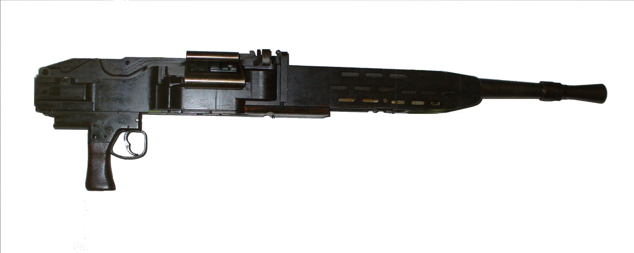 British Besa machine gun